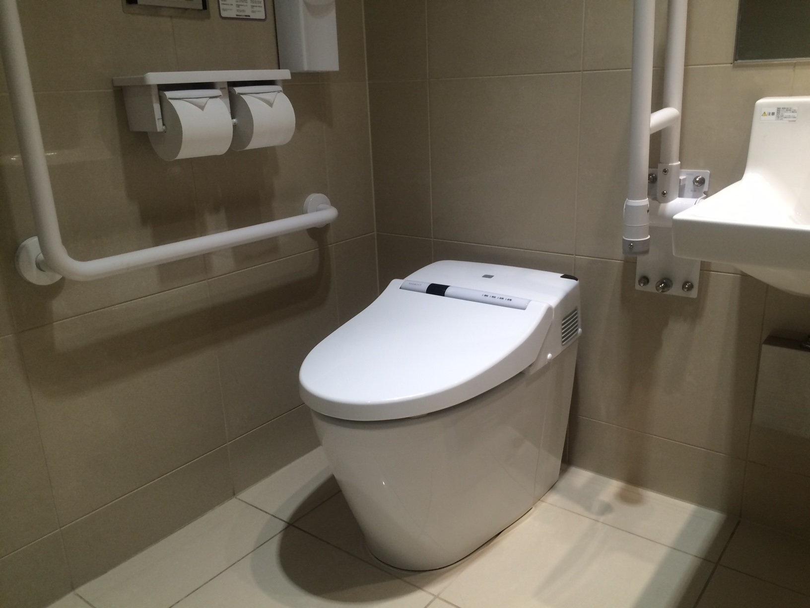 Calmic-3